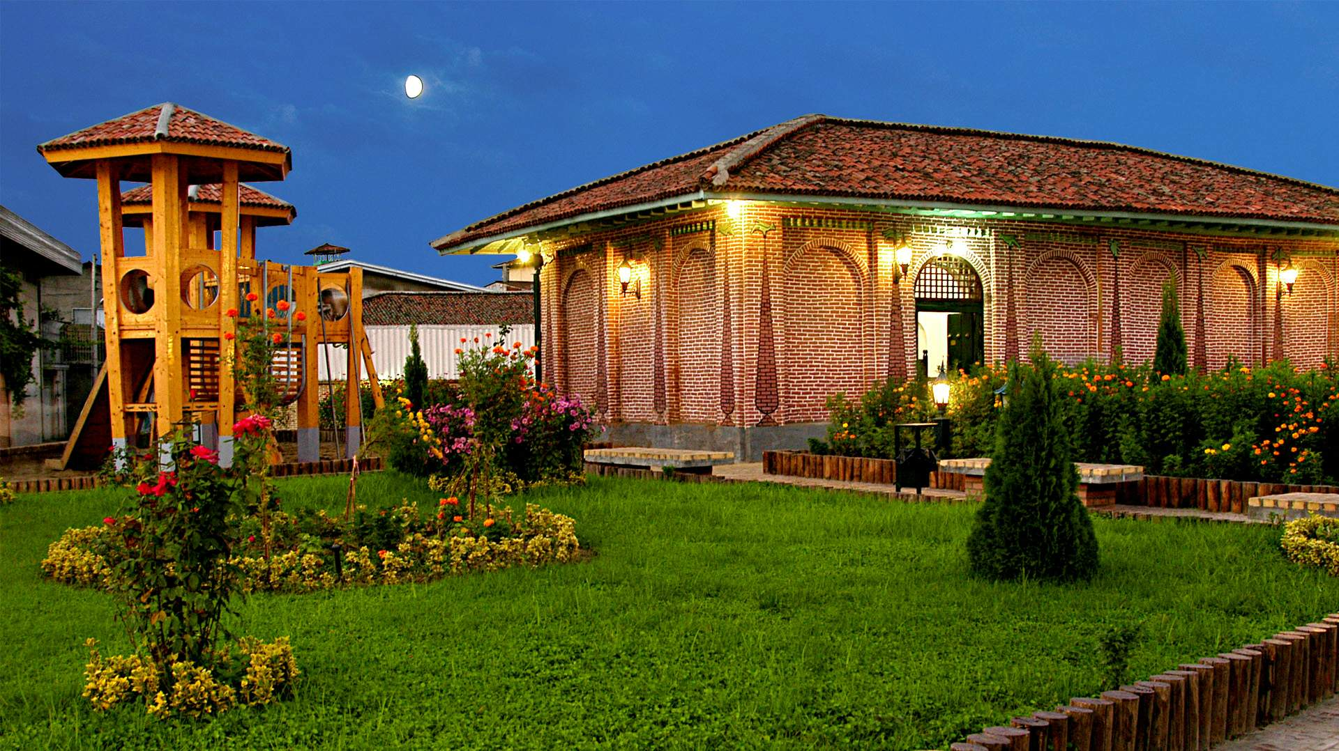 babol - hasir frooshan